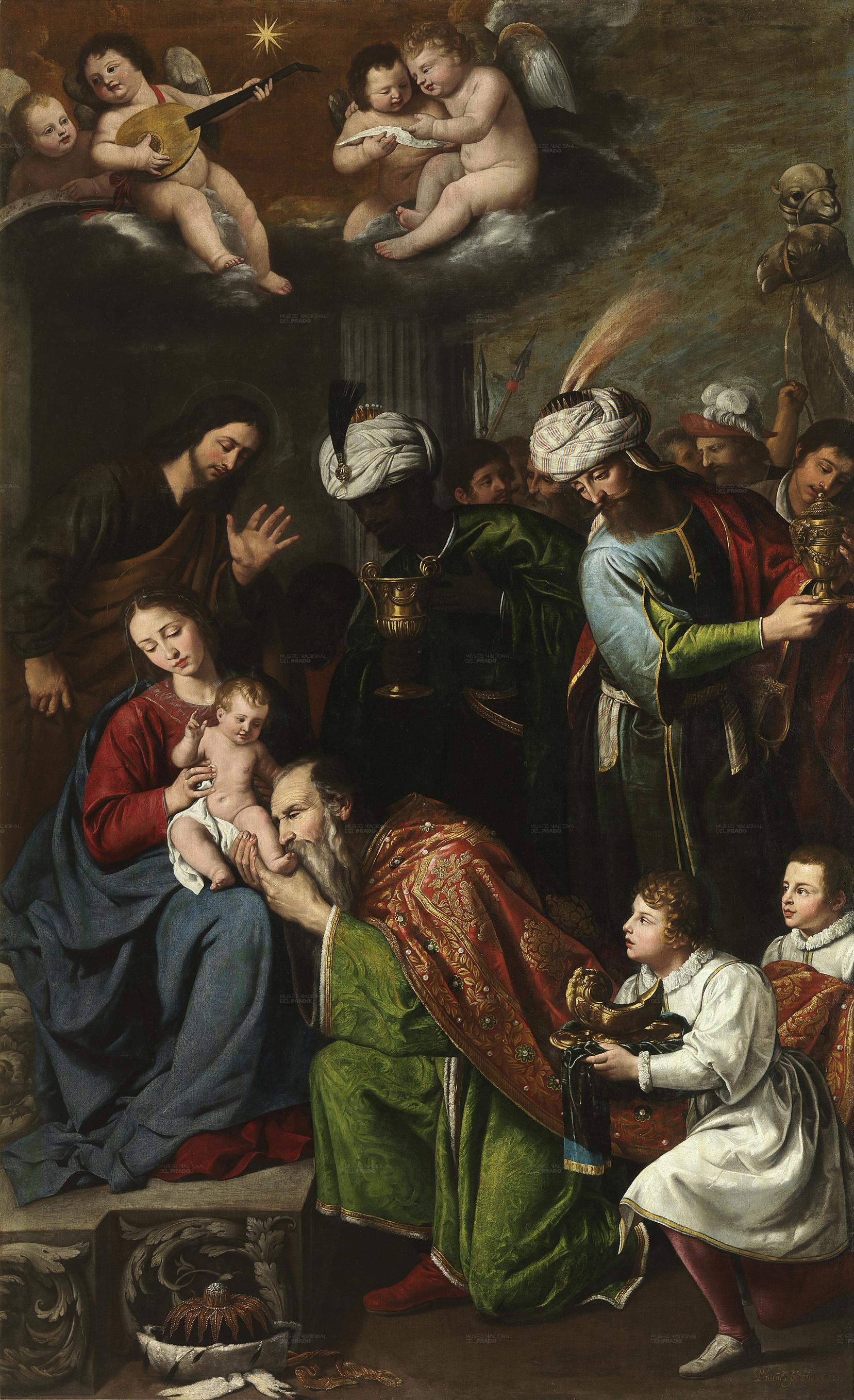 La obra representa el momento en que el Niño Jesús fue adorado por los tres Reyes magos.